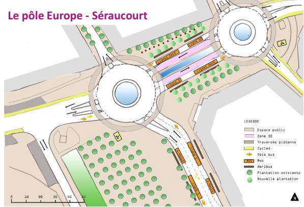 Futur pole multimodal de bourges